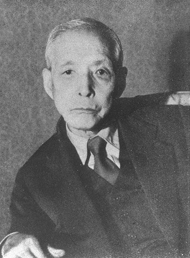 小林一三肖像。号、逸翁、別号、靄渓学人、靄渓山人。明治6年(1873)1月3日生、昭和32年(1957)1月25日没。